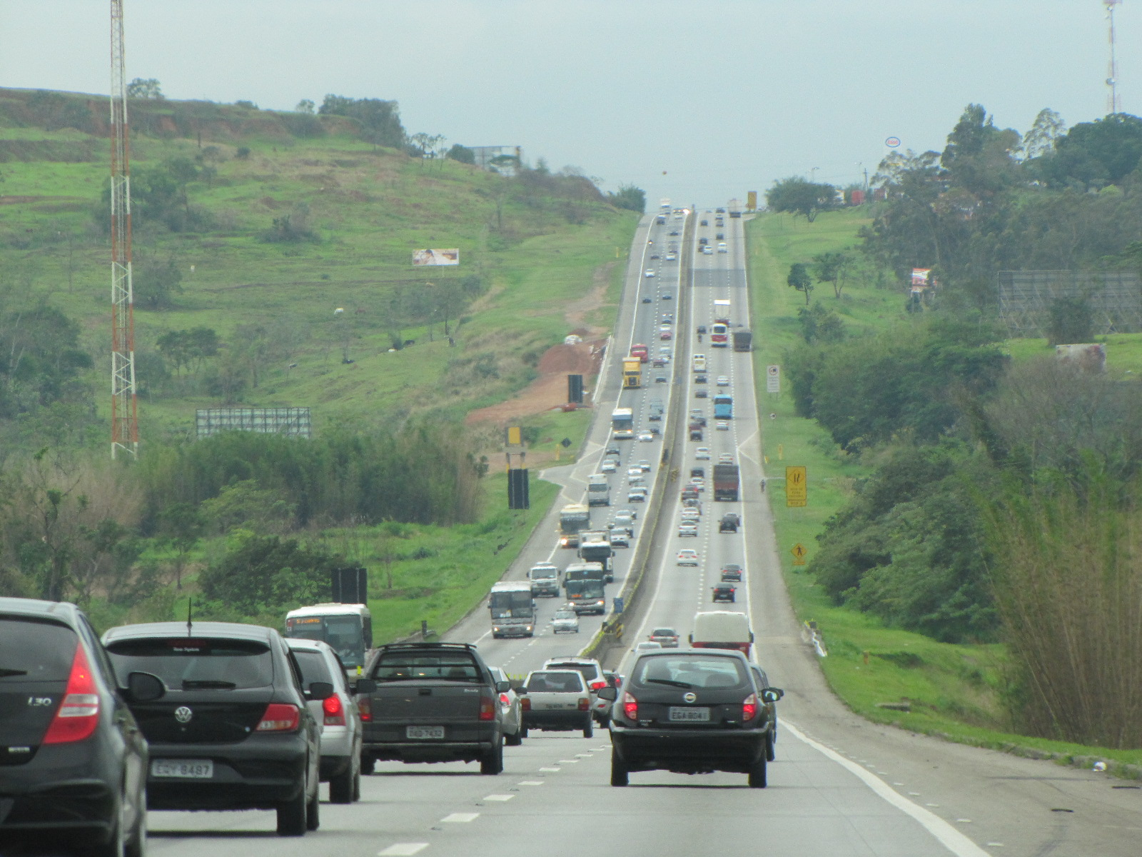 Rodovia Presidente Dutra (BR-116) no trecho entre Taubaté e Pindamonhangaba.